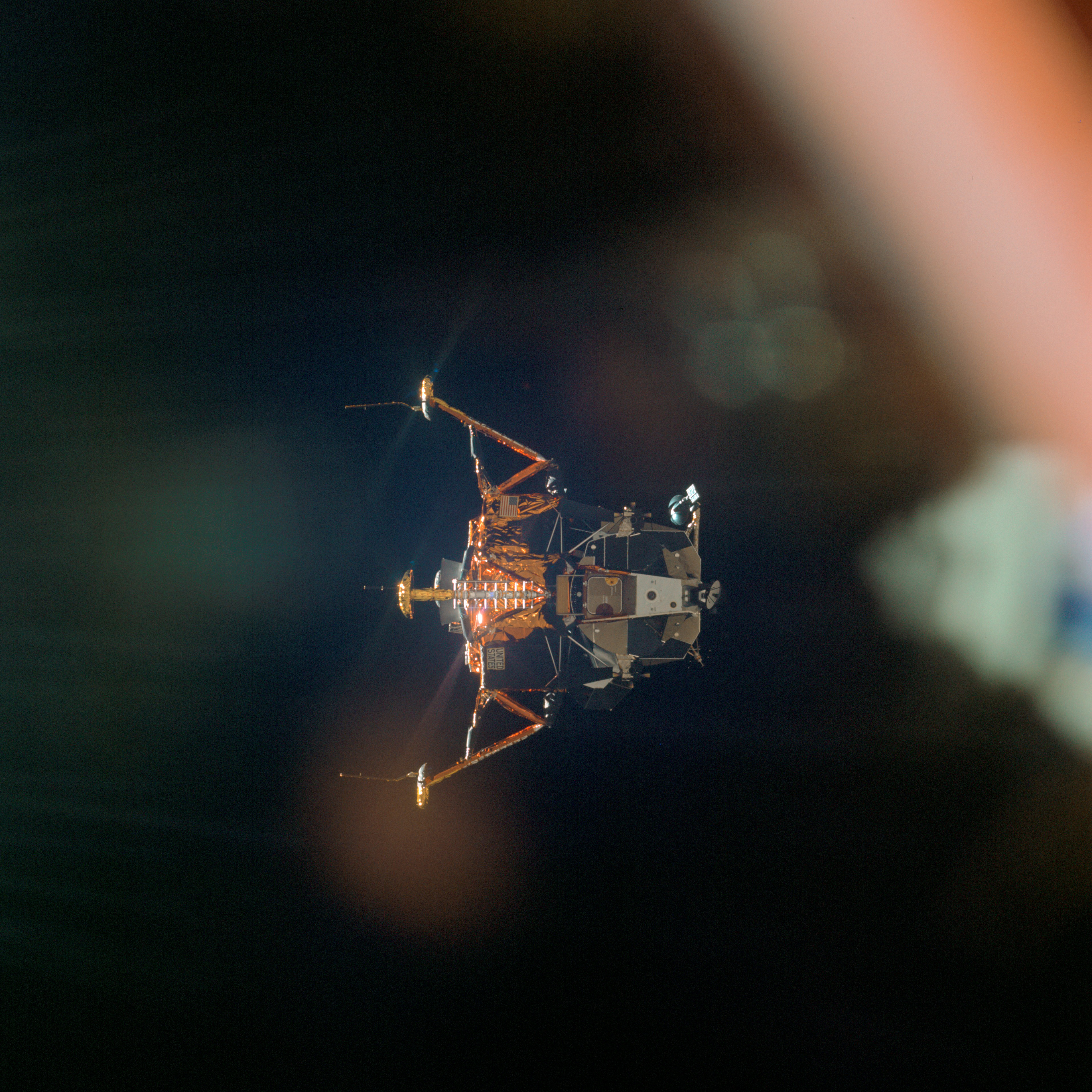 Лунный модуль "Аполлона-11" "Орёл" после расстыковки с командно-служебным модулем "Колумбия" на окололунной орбите.Unknown apollo 11 lunar module eagle after undocking with csm columbia.